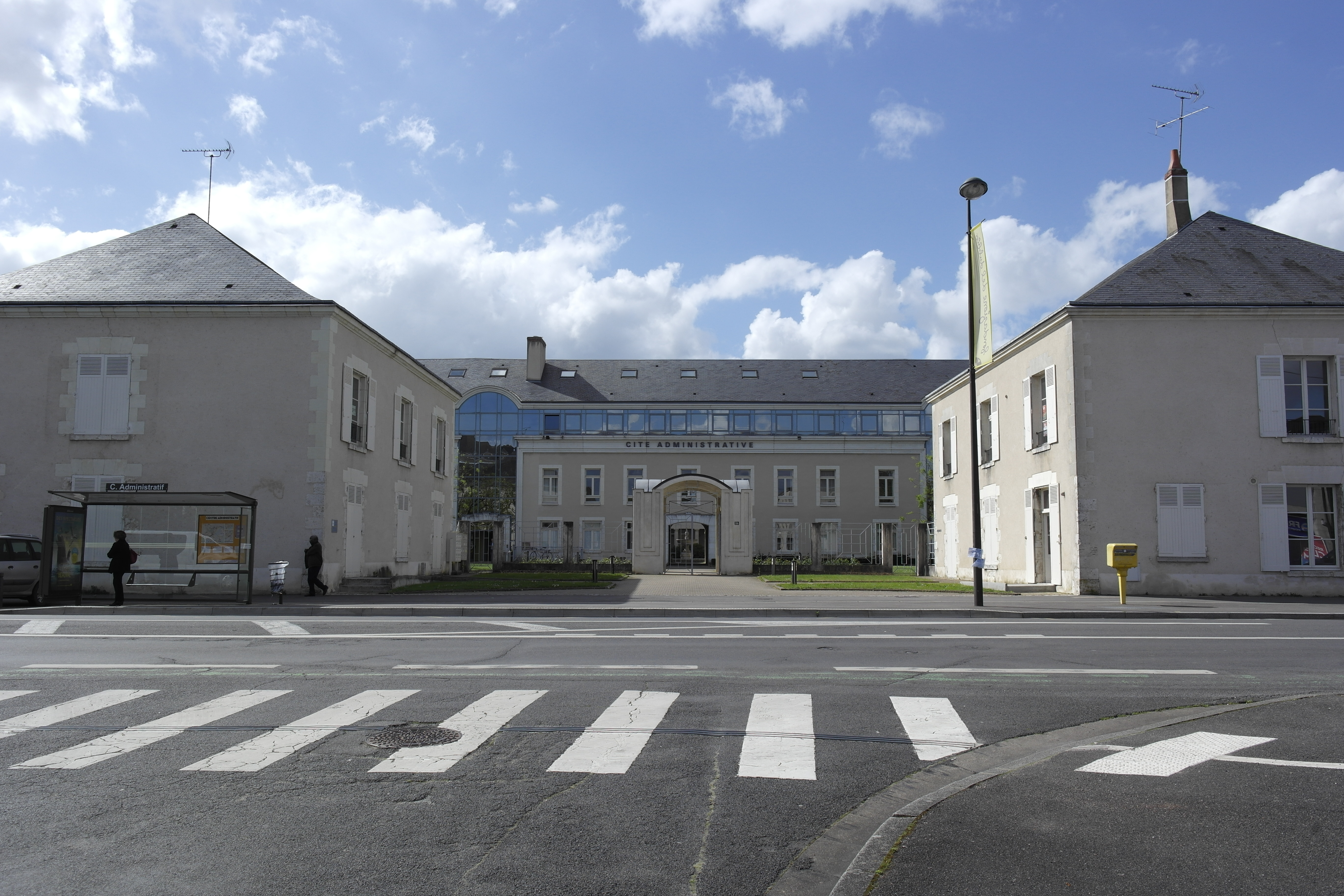 Vue de l'entrée de la cité administrative (avenue Maunoury) depuis la rue Paul-Reneaulme. Le bâtiment (largement remanié) abritait l'asile départemental de Loir-et-Cher jusqu'en 1943.